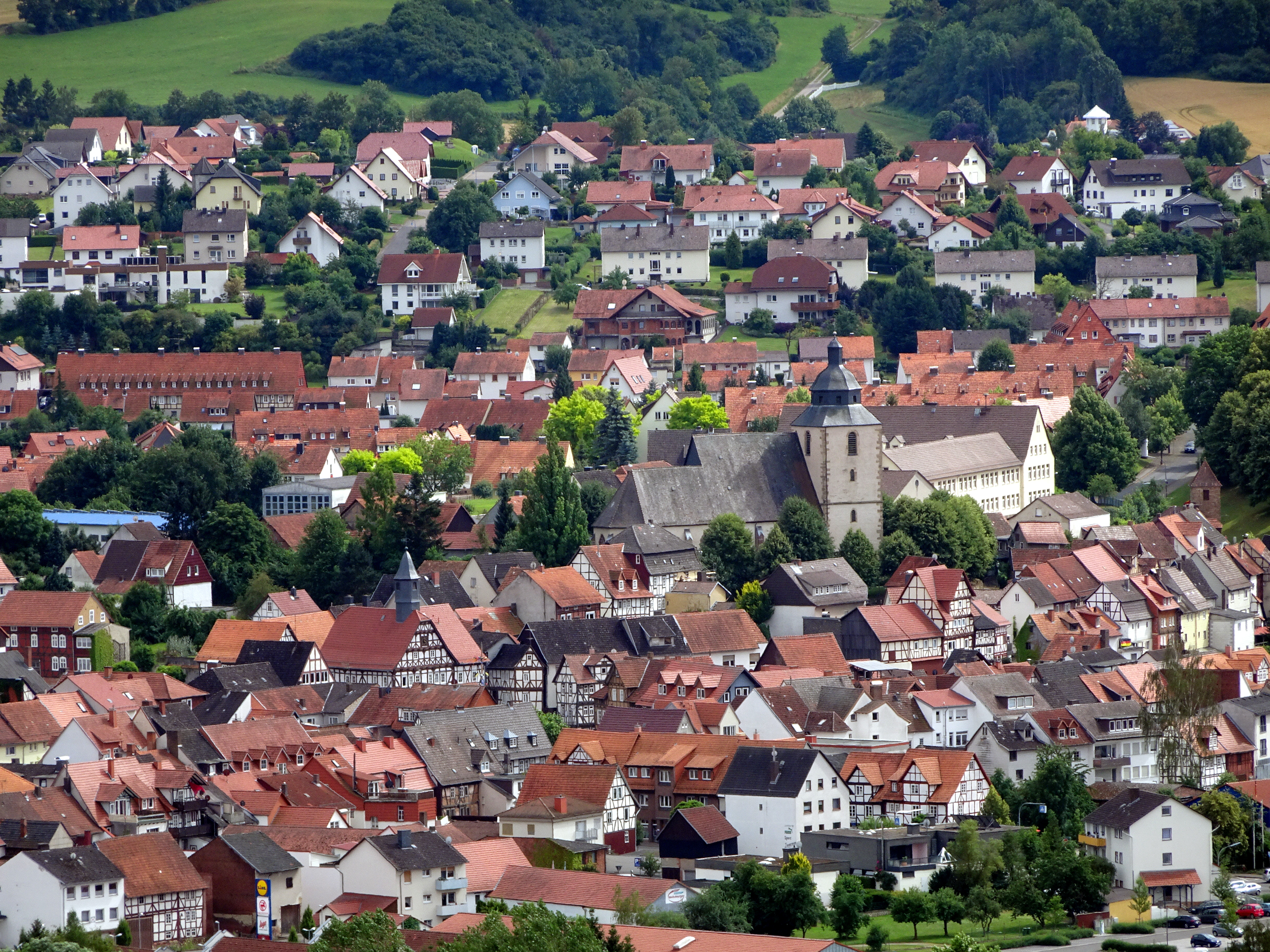 Sontra im nordhessischen Werra-Meißner-Kreis. Blick vom Mühlberg aus nördlicher Richtung. In der Bildmitte die nach dem Brand von 1558 wiederhergestellte evangelische Stadtkirche. Mit ihrem massiven Turm aus dem Beginn des 17. Jahrhunderts bestimmt sie entscheidend die Ortssilhouette. Links daneben zu sehen sind Türmchen und Giebel des Rathauses, das 1668 auf den Grundmauern des im 30jährigen Krieg zerstörten Gebäudes aufgerichtet wurde. Die Altstadt (innerhalb der Stadtmauer des 14. Jahrhunderts) wird als Gesamtanlage vom Denkmalschutz als schützenswert erachtet.